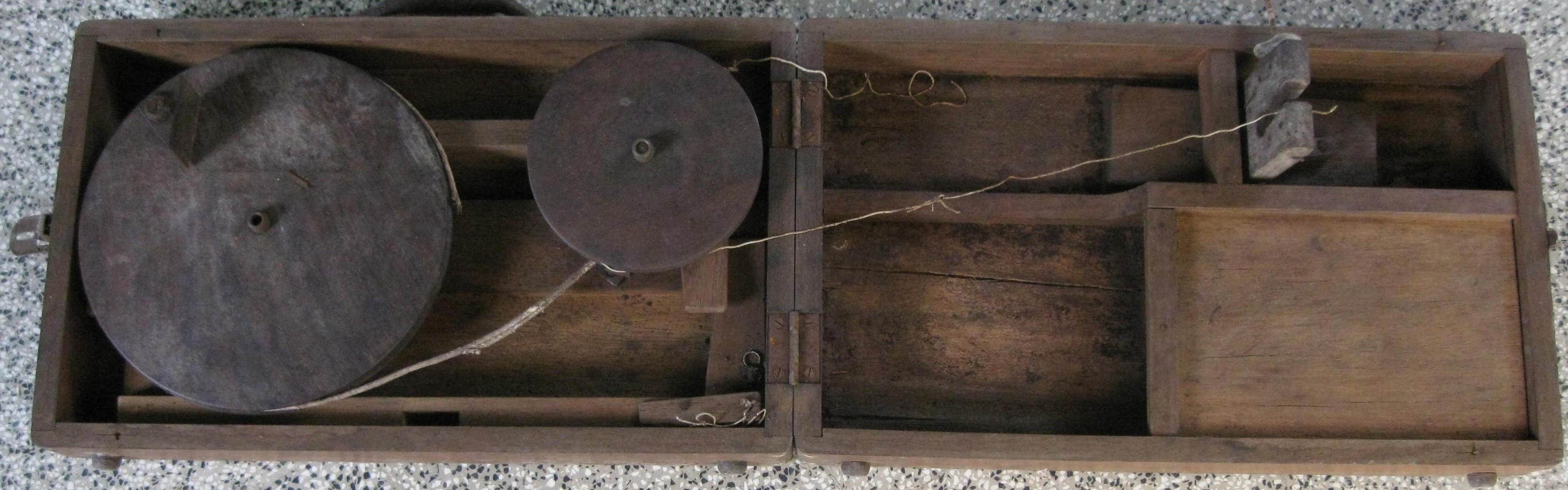 கை நூற்பு ராட்டை